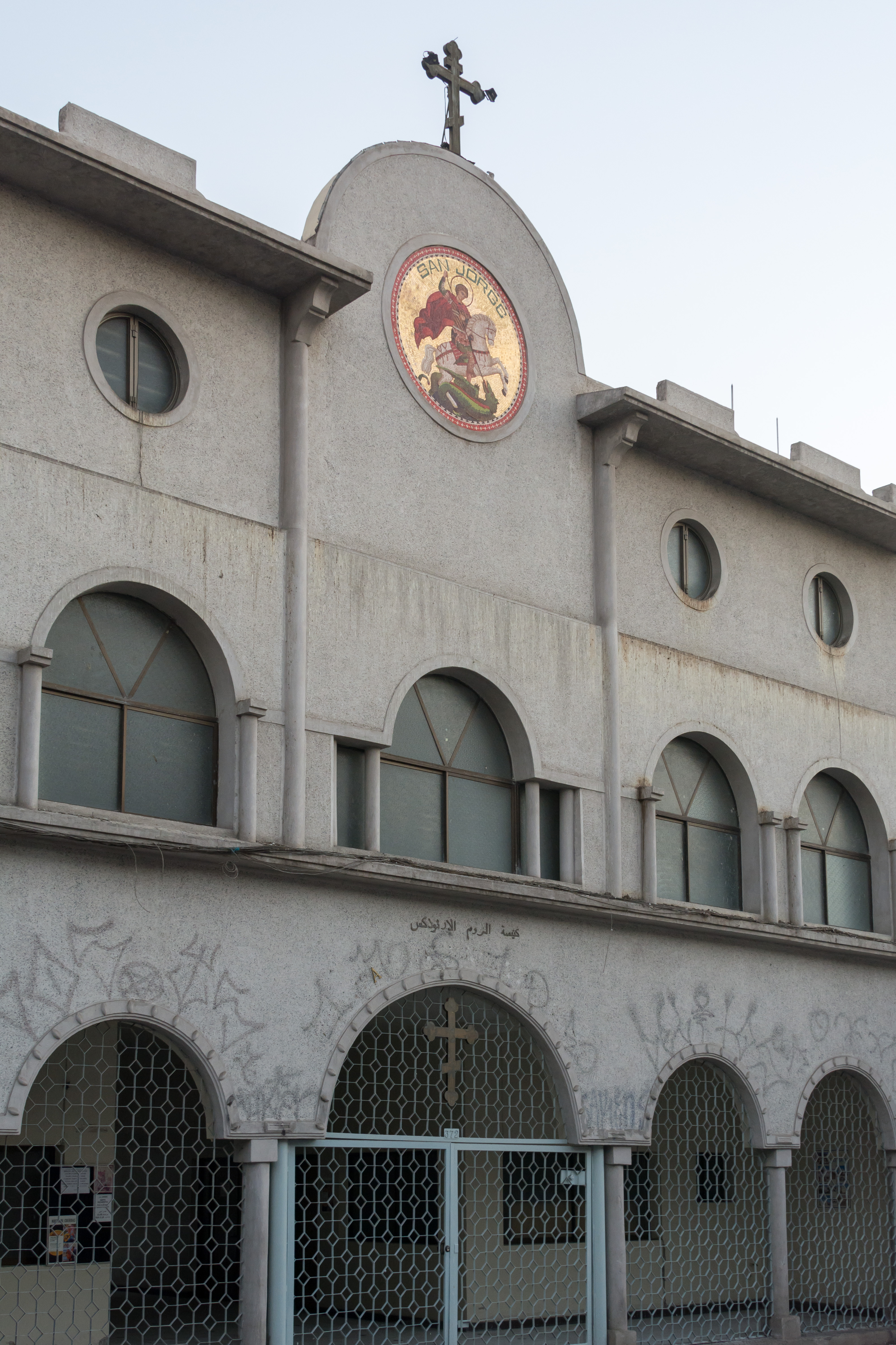 Catedral de San Jorge, Santiago, Región Metropolitana de Santiago, Chile